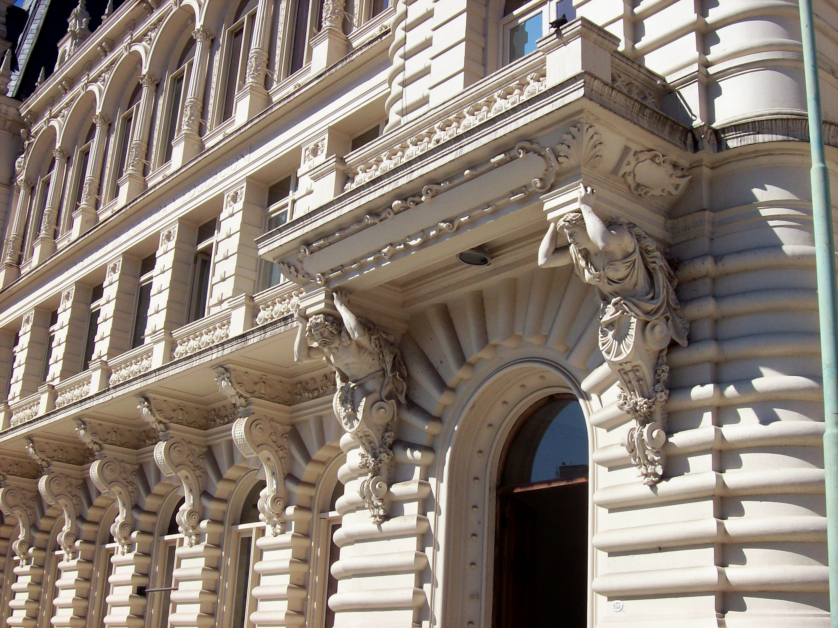 Palacio Pizzurno (Ministerio de Educación), en Recoleta, Buenos Aires. (Detalle)